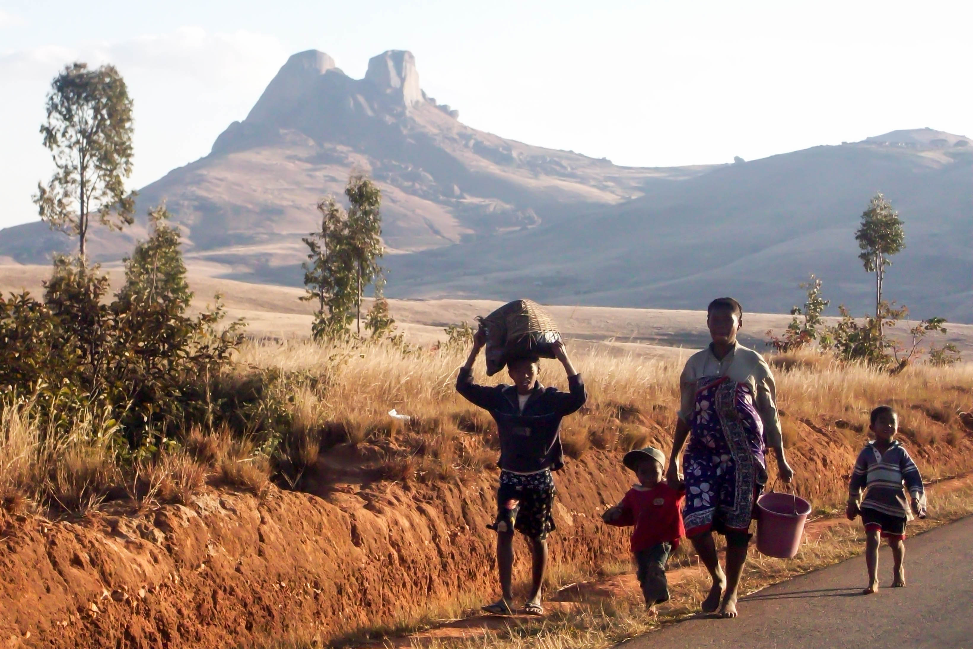 Une famille sur la route This is an image of Cultural Fashion or Adornment from Madagascar